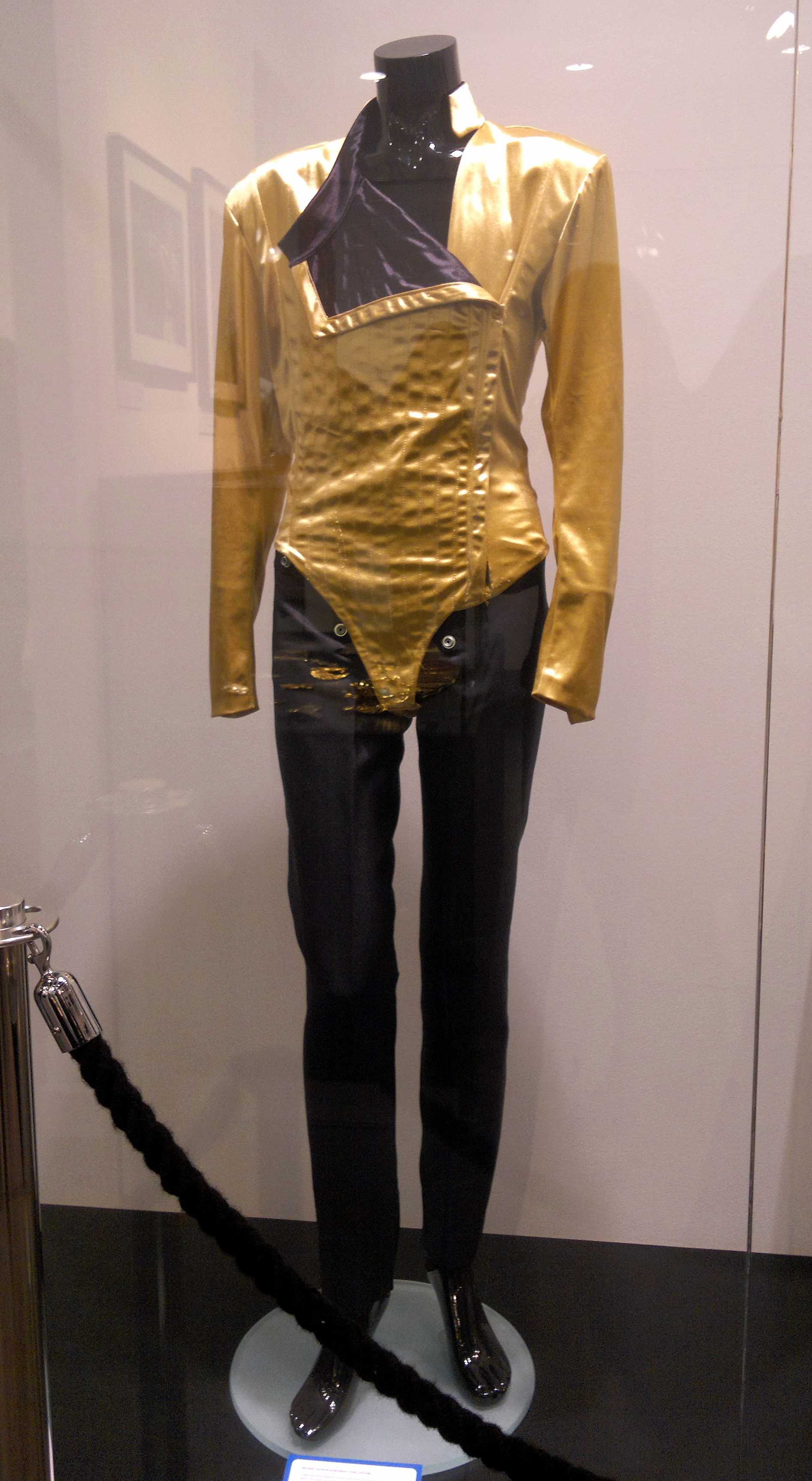 Traje Usado en la gira Dangerous World Tour expuesto en la exhibicion immortal tour del Cirque du soleil.